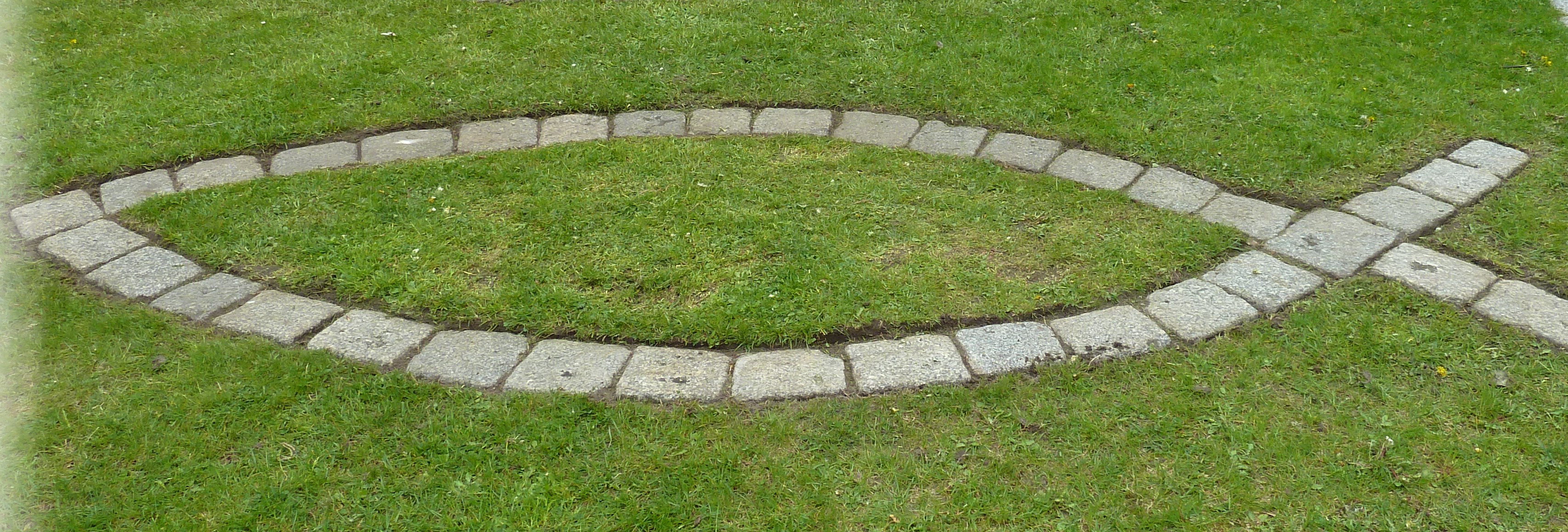 Christliches Symbol: Fisch (=griech.: Ichthys)